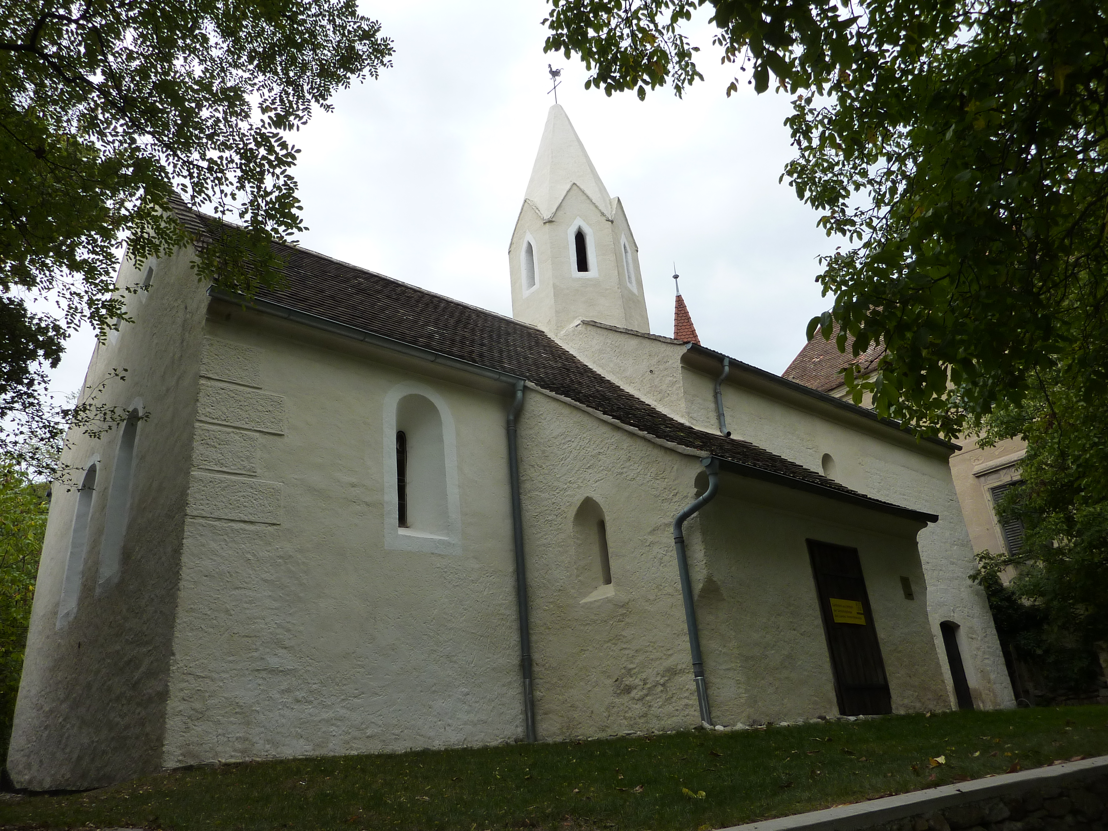 Aufbahrungshalle, ehem. Pfarrkirche hl. Georg und ehem. Schlosskapelle, Droß, Niederösterreich